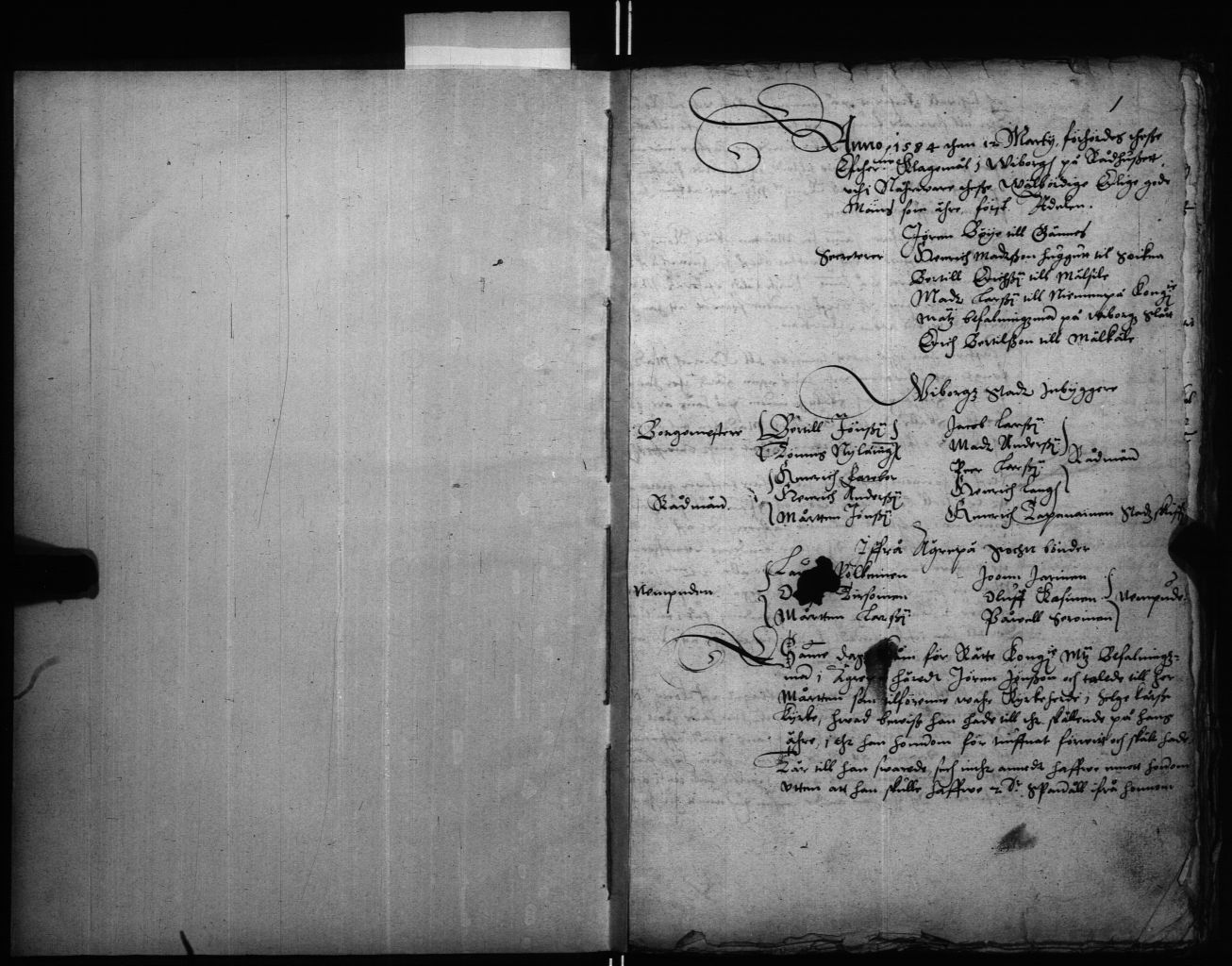 Viipurin läänin tuomiokirja, 1584, s.1